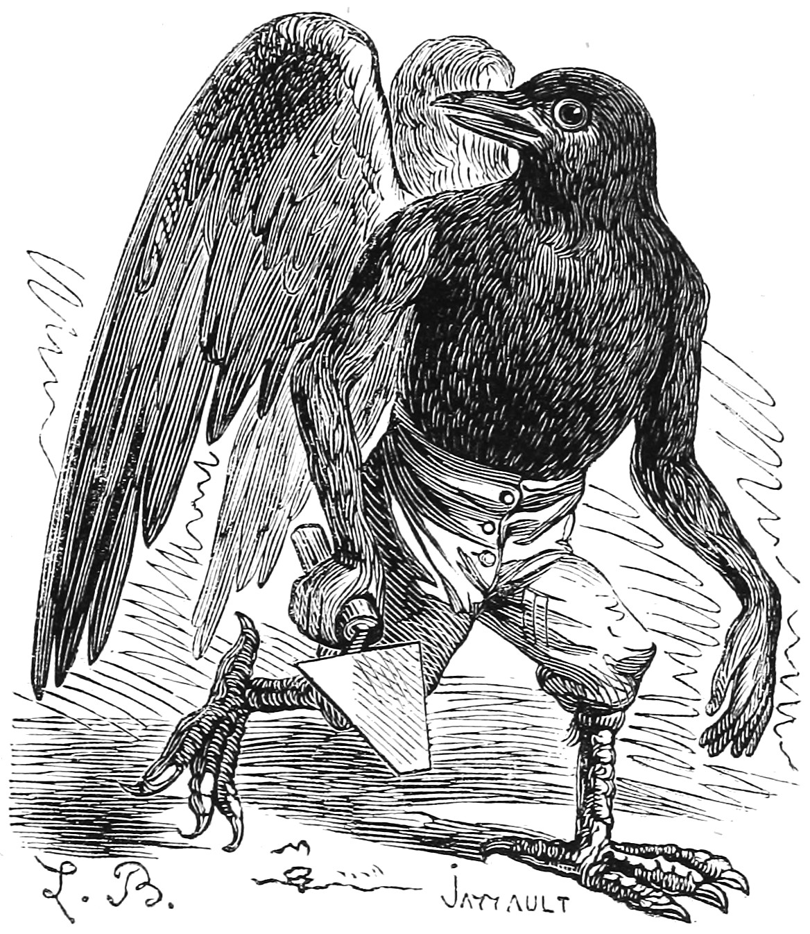 Illustration du Dictionnaire infernal de Jacques Auguste Simon Collin de Plancy par Louis Le Breton, 6eme édition, 1863.